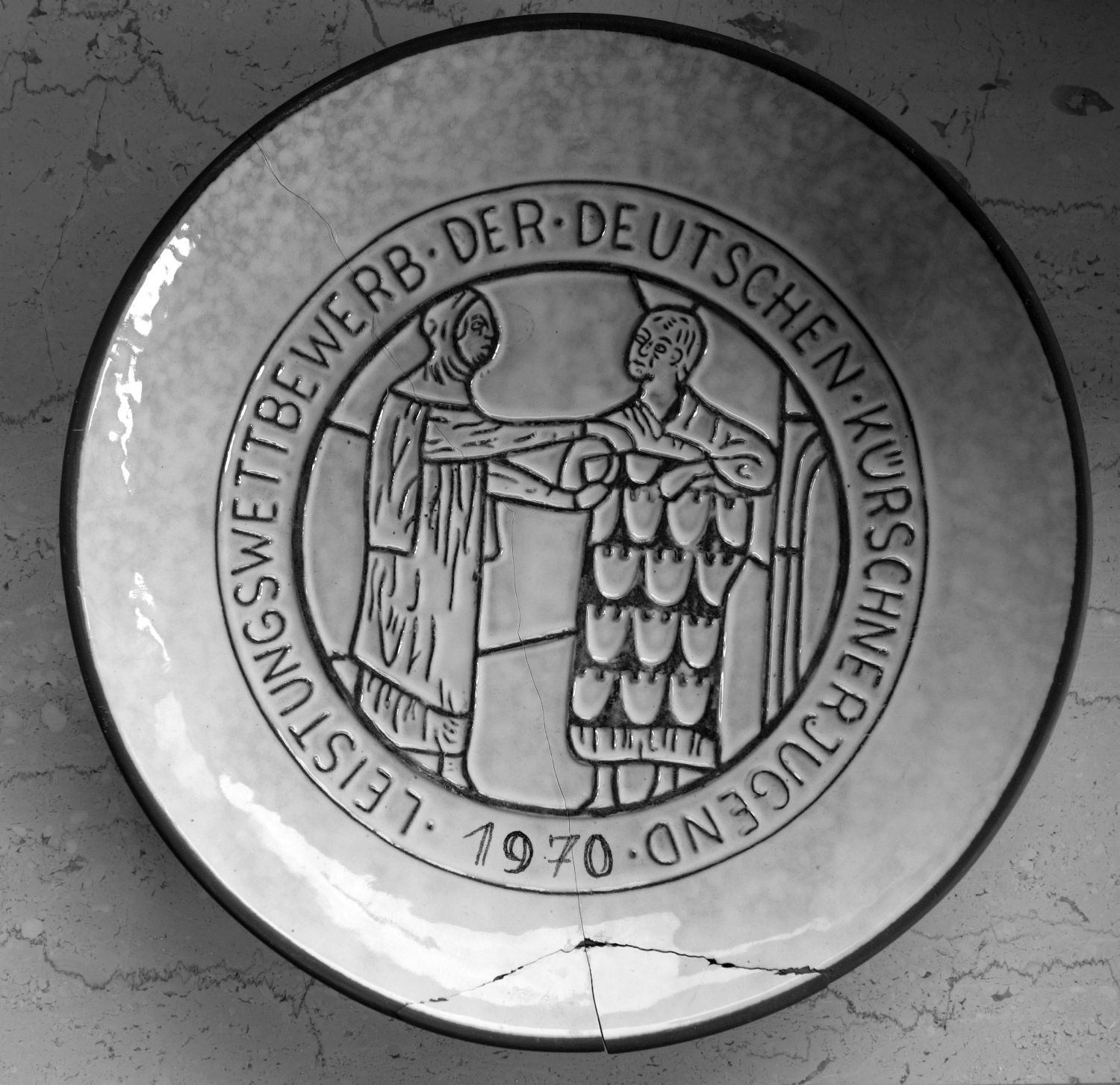 Teller Leistungswettbewerb der deutschen Kürschnerjugend 1970 mit der Darstellung eines Kürschners (nach einem Medaillon von dem Fenster „St. Jakobus der Ältere“, gestiftet von der Kürschnerzunft von Chartres, in der Kathedrale von Chartres: Der Kürschner zeigt einem Kundenpaar ein Fehwammenfutter). Gesehen bei Biel Pelze, Bad Hersfeld, Badestube 6, nach der Geschäftsaufgabe.